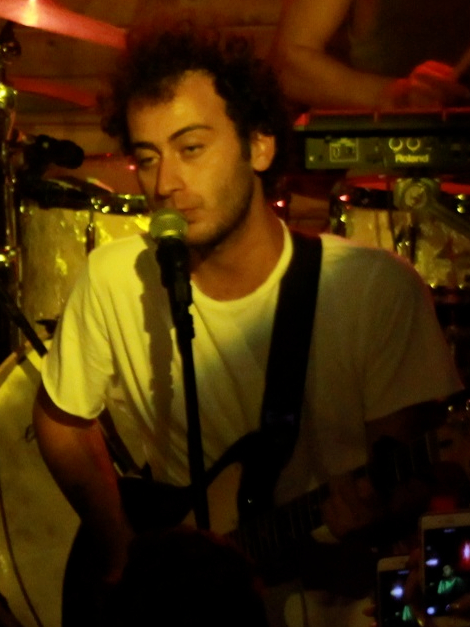 Yüzyüzeyken Konuşuruz, 17 Temmuz 2018 Olimpos, Antalya konserlerinde sahne verirken.